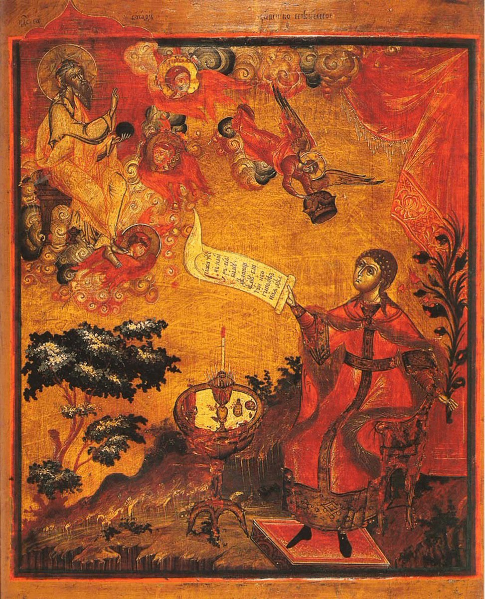 Царство Небесное Первая половина XIX в. Государственный музей истории религии, Санкт-Петербург